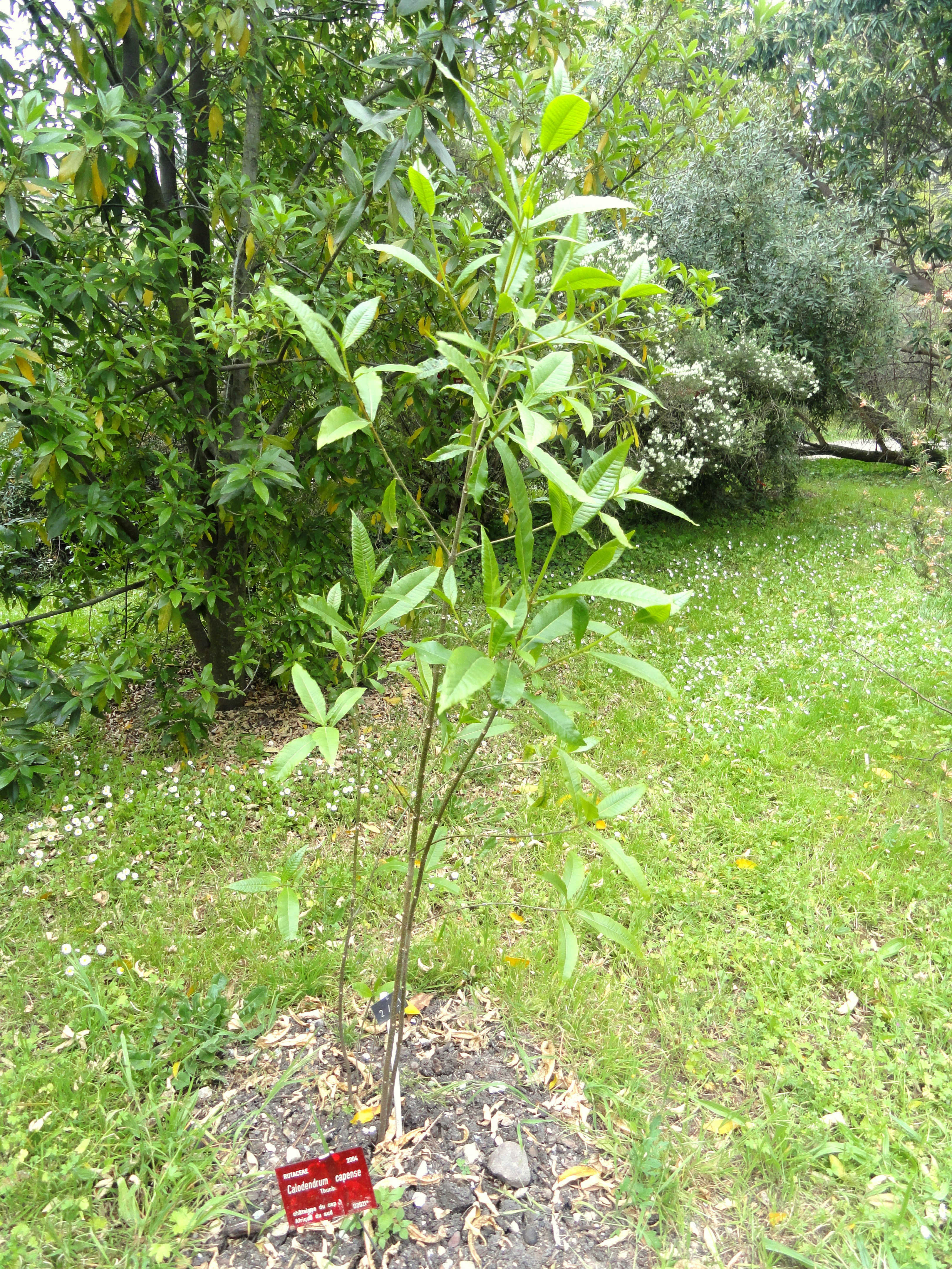 Calodendrum capense specimen in the Jardin botanique de la Villa Thuret, Antibes Juan-les-Pins, Alpes-Maritimes,France.